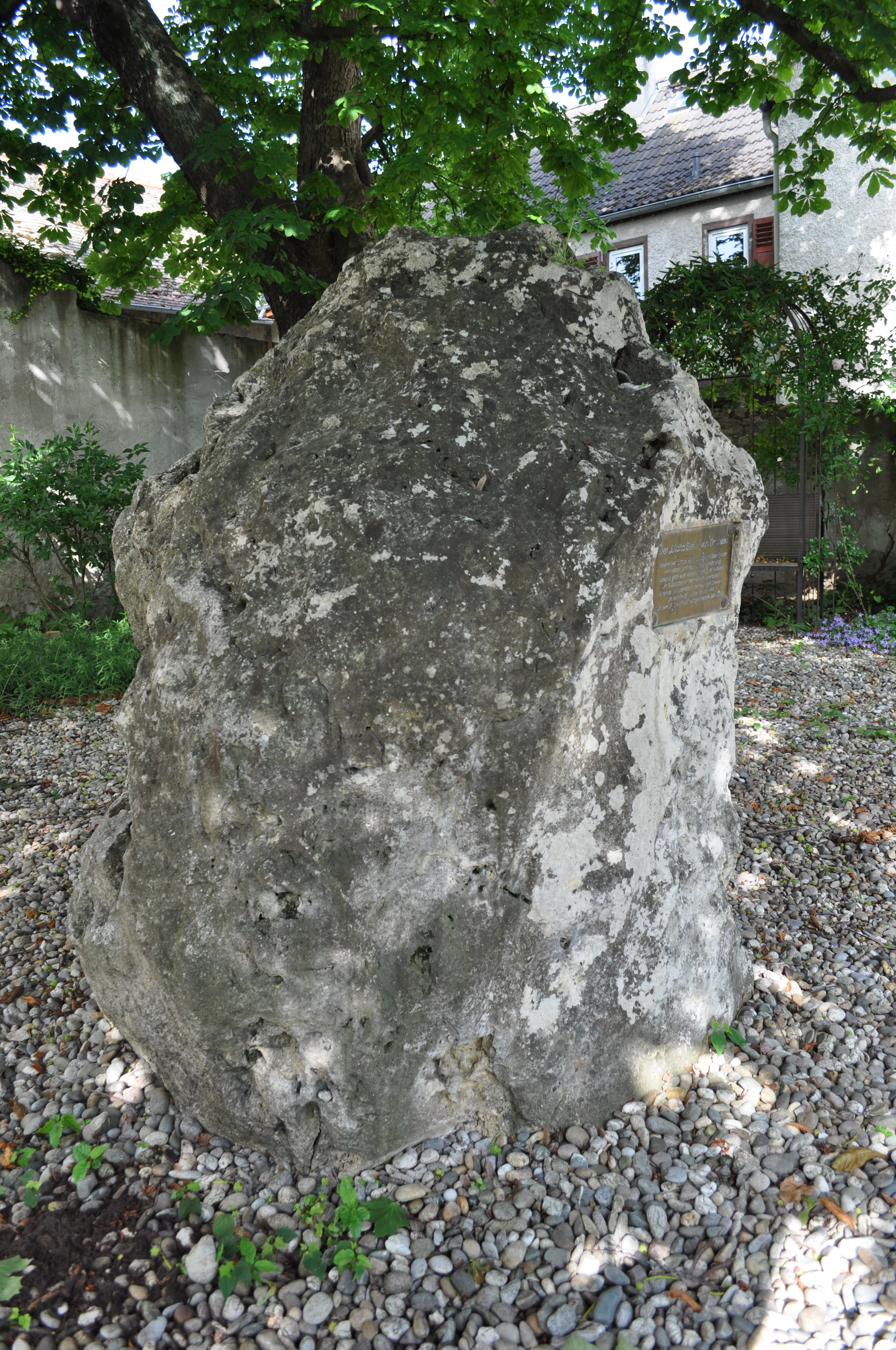 Der "Dicke Stein" aus Dexheim, Menhir, vorgeschichtlicher Kultstein, mittelalterlicher Grenzstein, seit 2000 auf dem "Freien Platz" in Dexheim